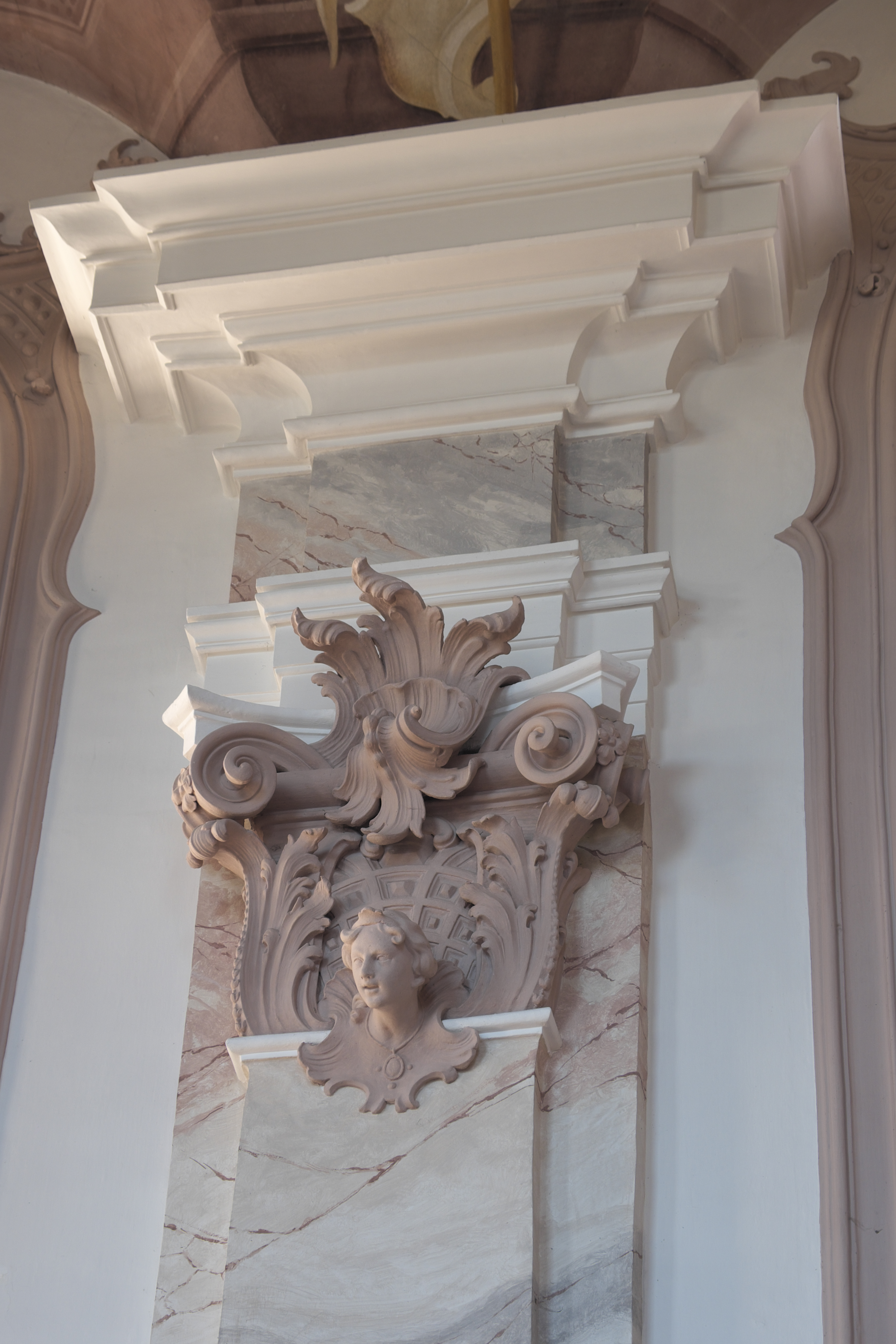 Katholische Pfarrkirche St. Gordian und Epimachus in Stöttwang im Landkreis Ostallgäu (Bayern/Deutschland), Stuckdekor von Franz Xaver Feuchtmayer, von 1745, Pilaster mit Kapitell